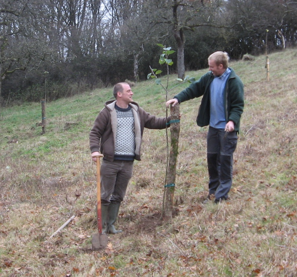 Pflanzung eines Apfelbaums im NSG Steinert bei Sundern-Allendorf